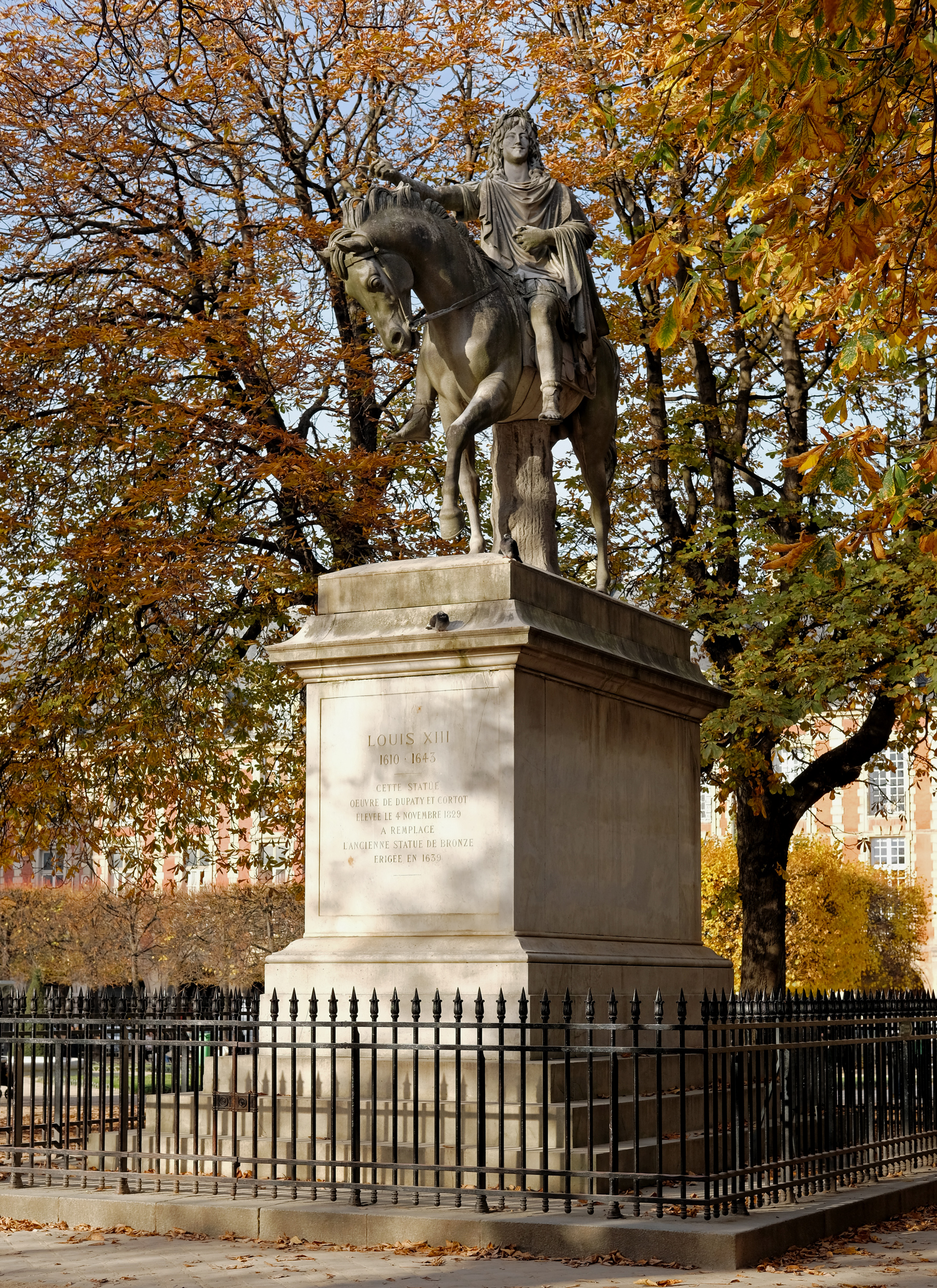 Statue de Louis XIII (oeuvre de Louis Dupaty et Jean-Pierre Cortot) élevée en 1829 en remplacement d'une ancienne statue érigée en 1639. - Paris IV, square Louis XIII